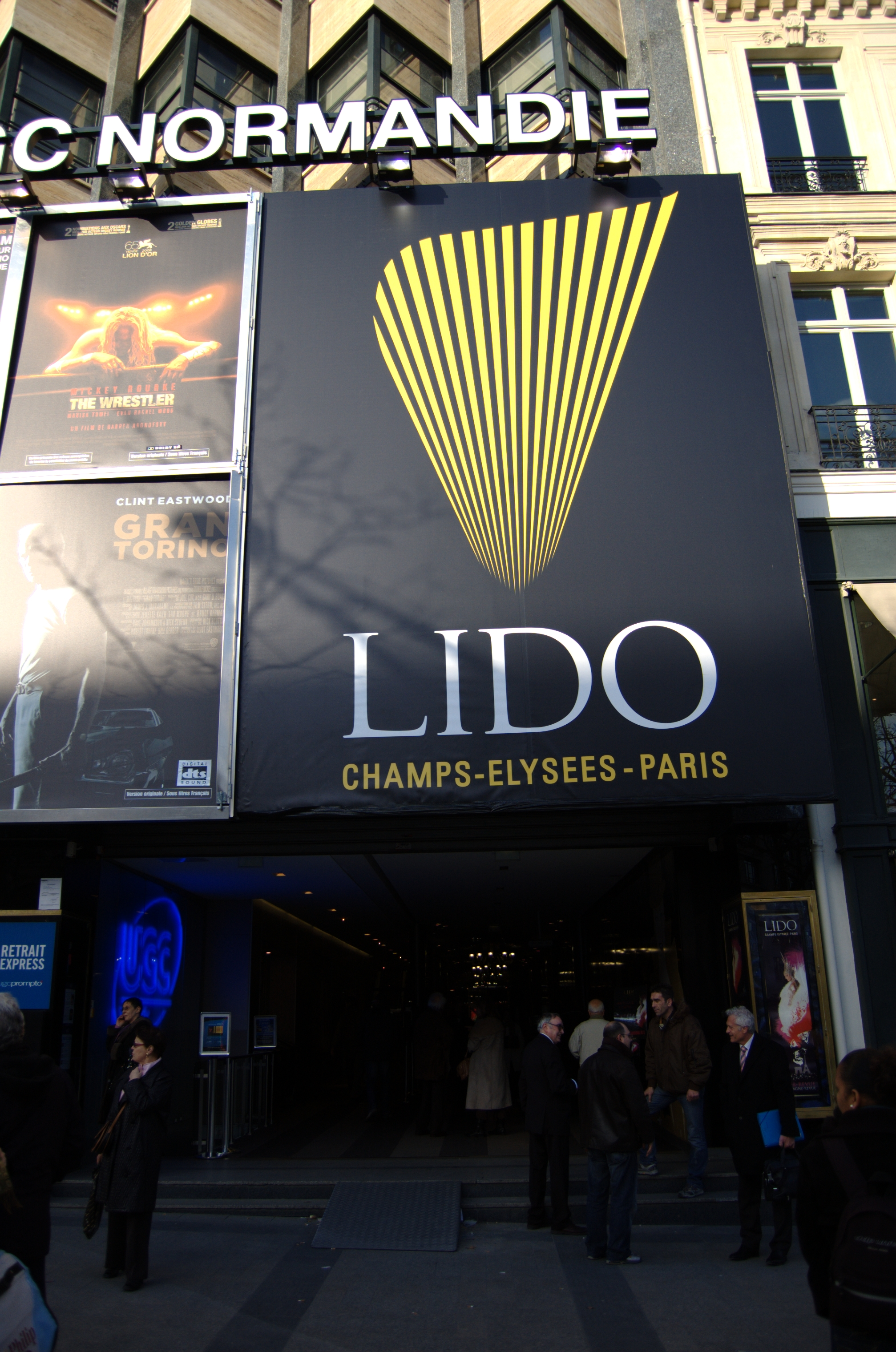 Le Lido - Paris. 06 mars 2009